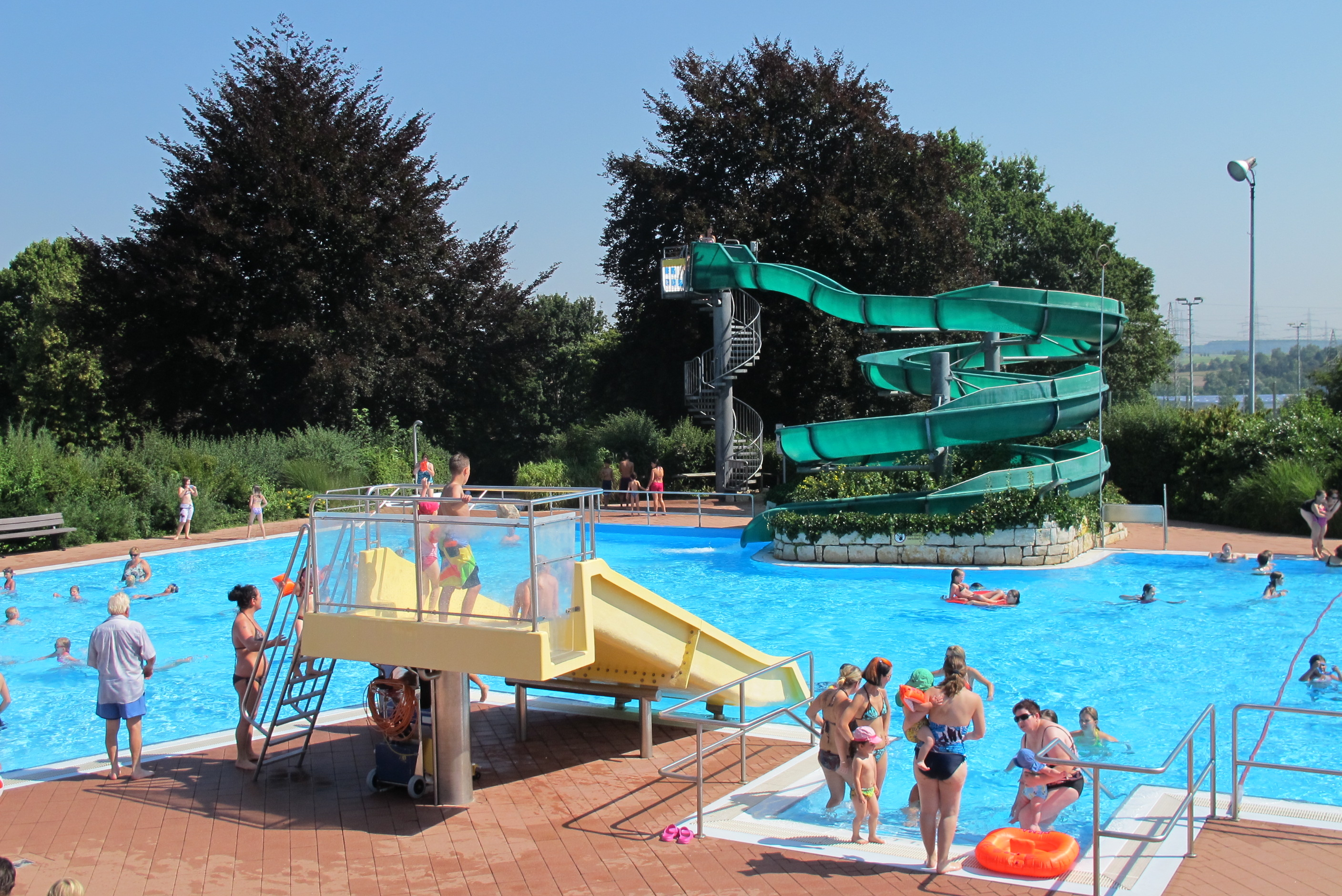 Schönes Wetter lockt einige Besucher ins Terrassen-Freibad der Stadt Wendlingen am Neckar